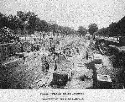 Construction du chemin de fer métropolitain municipal de Paris. Station "place Saint-Jacques", construction des murs latéraux. [cote BNF : PH451A]